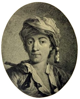 Selbstbildnis des deutschen Malers Johann Georg Trautmann.